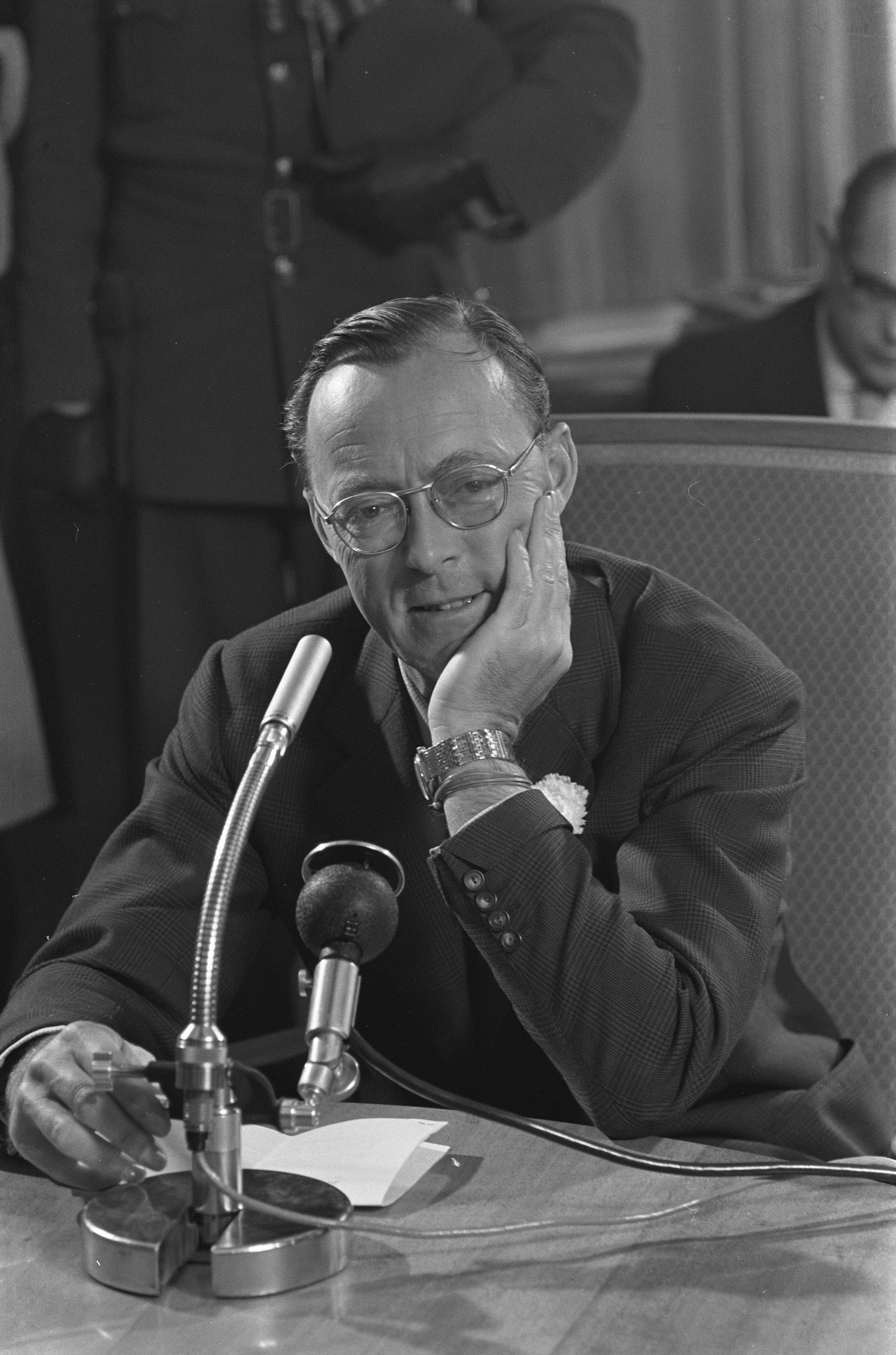 Collectie / Archief : Fotocollectie Anefo Reportage / Serie : [ onbekend ] Beschrijving : Aankomst van Prins Bernhard op Schiphol vanuit Zuid Amerika , Prins Bernhard tijdens persconferentie Datum : 4 november 1959 Locatie : Noord-Holland, Schiphol Trefwoorden : AANKOMST, persconferenties Persoonsnaam : Bernhard, prins Fotograaf : Pot, Harry / Anefo Auteursrechthebbende : Nationaal Archief Materiaalsoort : Negatief (zwart/wit) Nummer archiefinventaris : bekijk toegang 2.24.01.05 Bestanddeelnummer : 910-7969